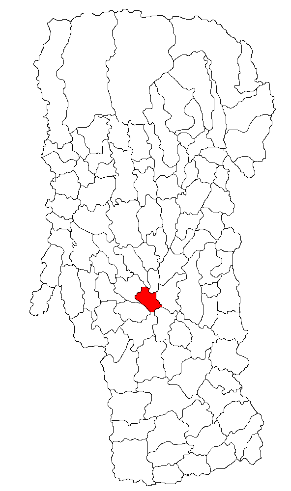 Categorie:Hărţi ale judeţului Argeş